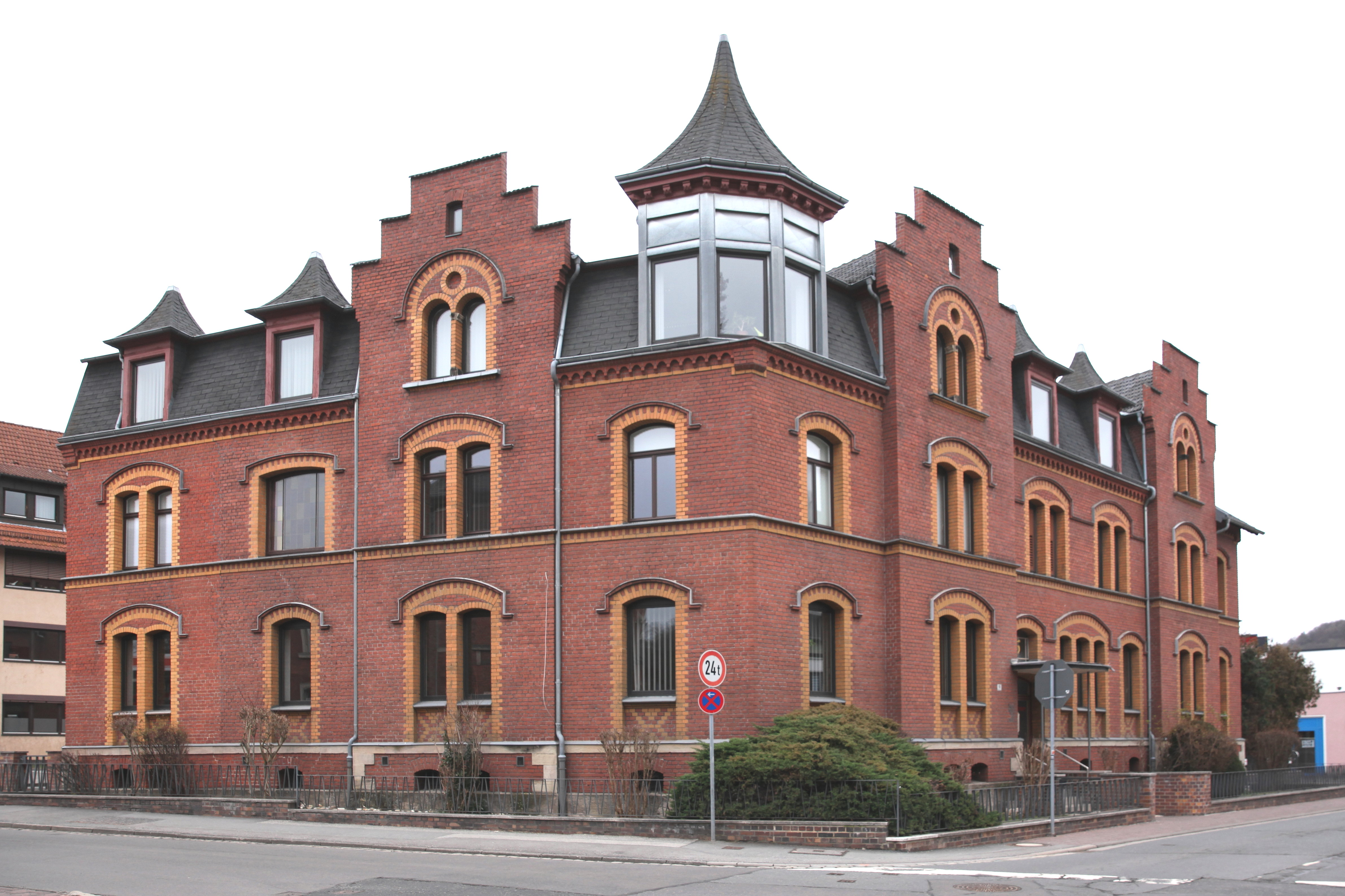 Callenberger Str. 18 in Coburg